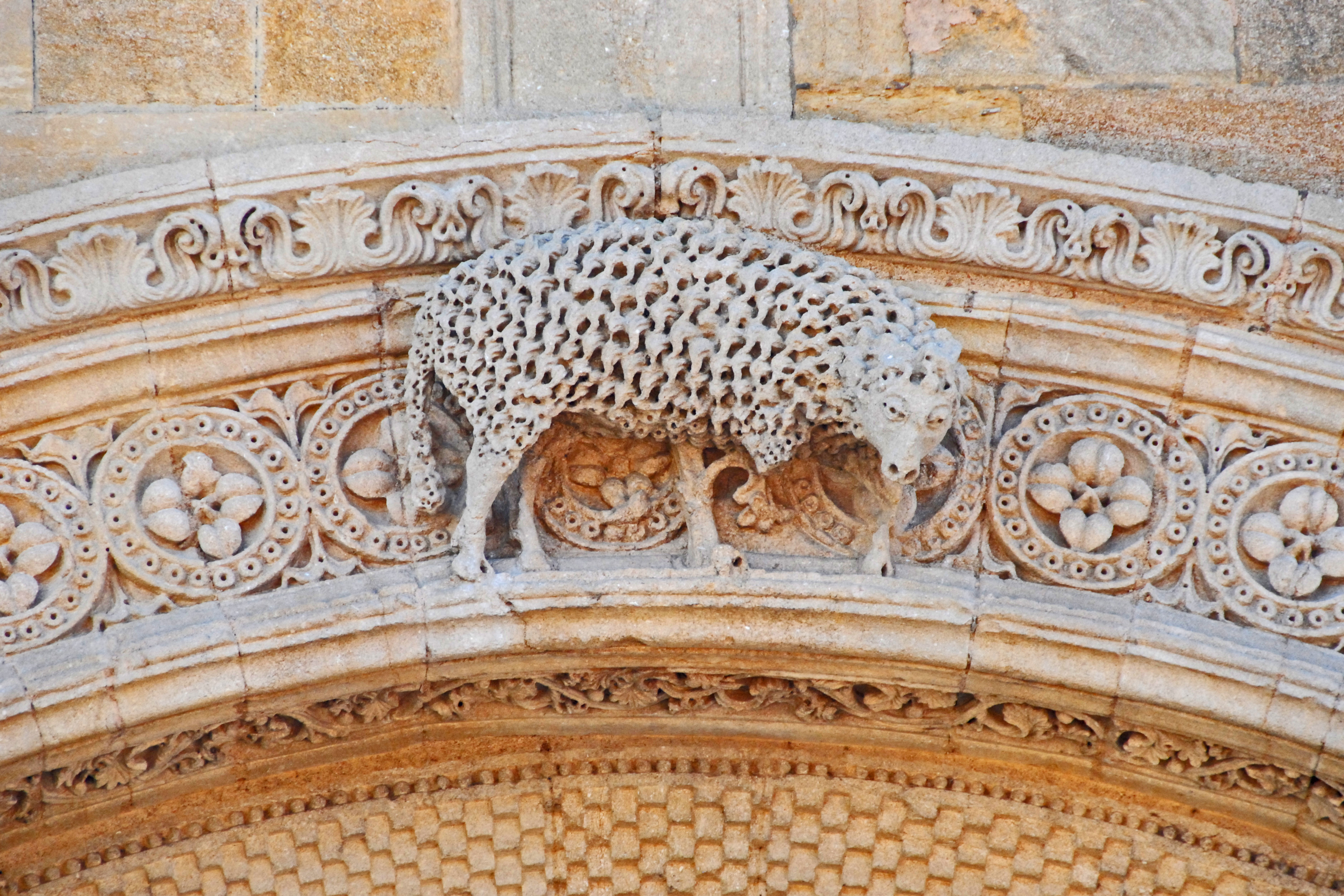 Großes Nordportal, Agnus Dei